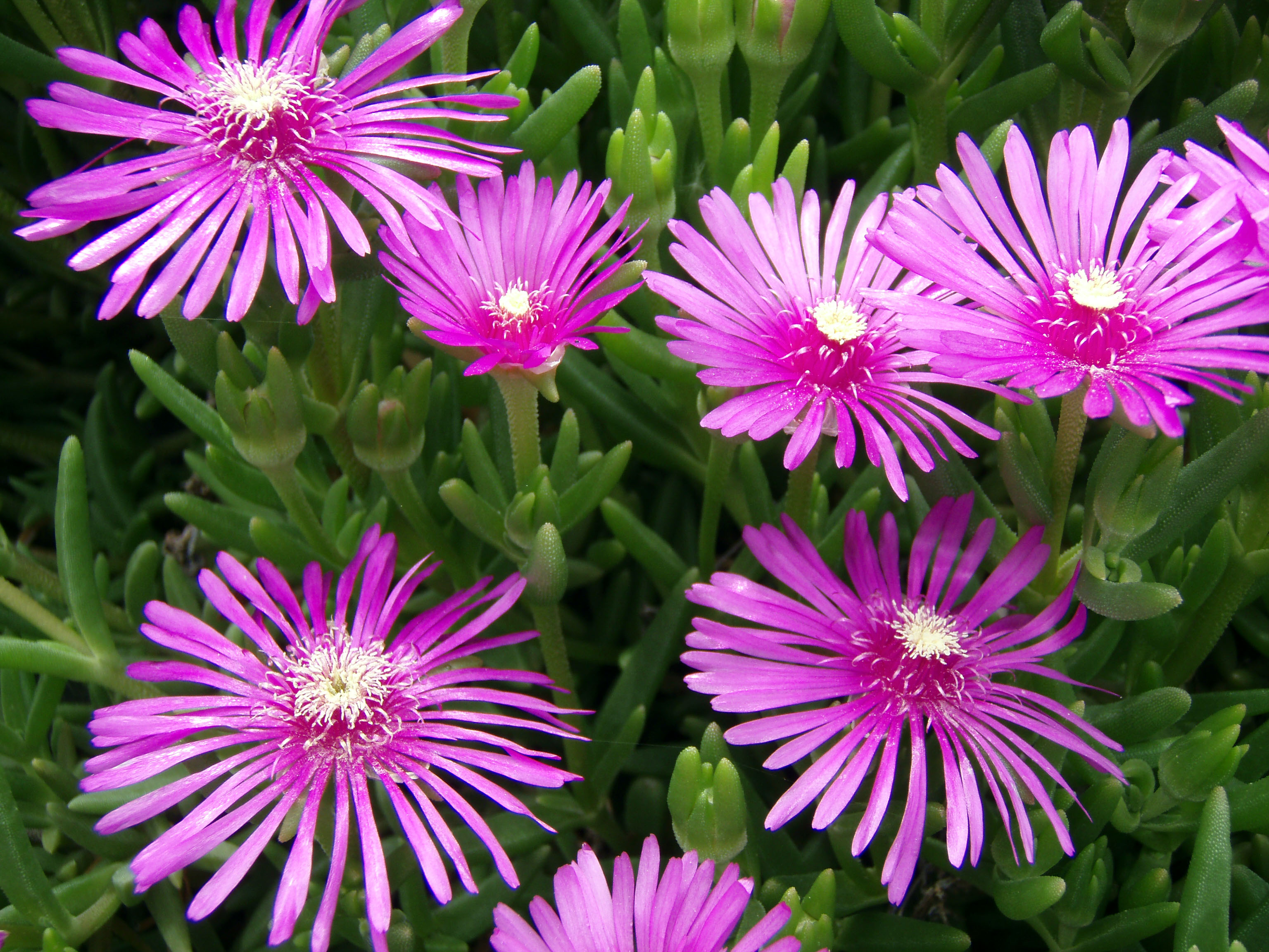 Lampranthus spectabilis